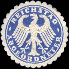 Sealing stamp Title: Reichstag Abgeordneter Description: blau, weiß, geprägt Place: Berlin size: 4 cm